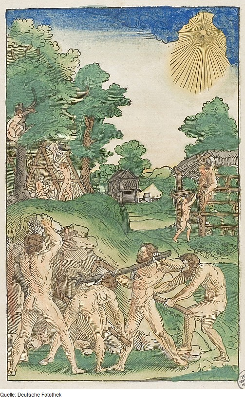 Original image description from the Deutsche Fotothek Architektur